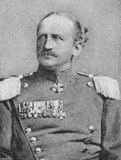 Kommandeur Ulanen-Regiment "Großherzog Friedrich von Baden" (Rheinisches) Nr. 7